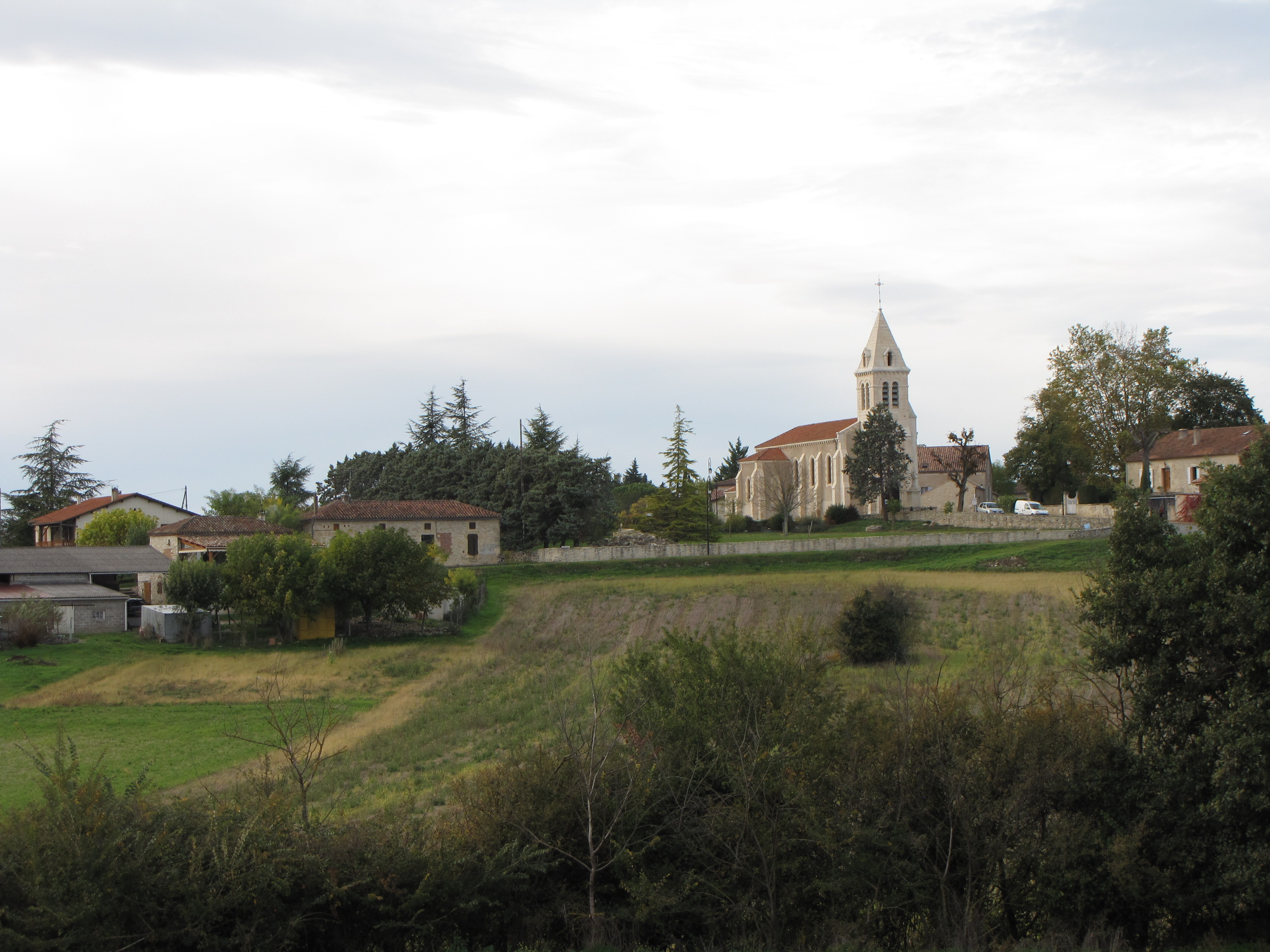 Thézac (Lot-et-Garonne)